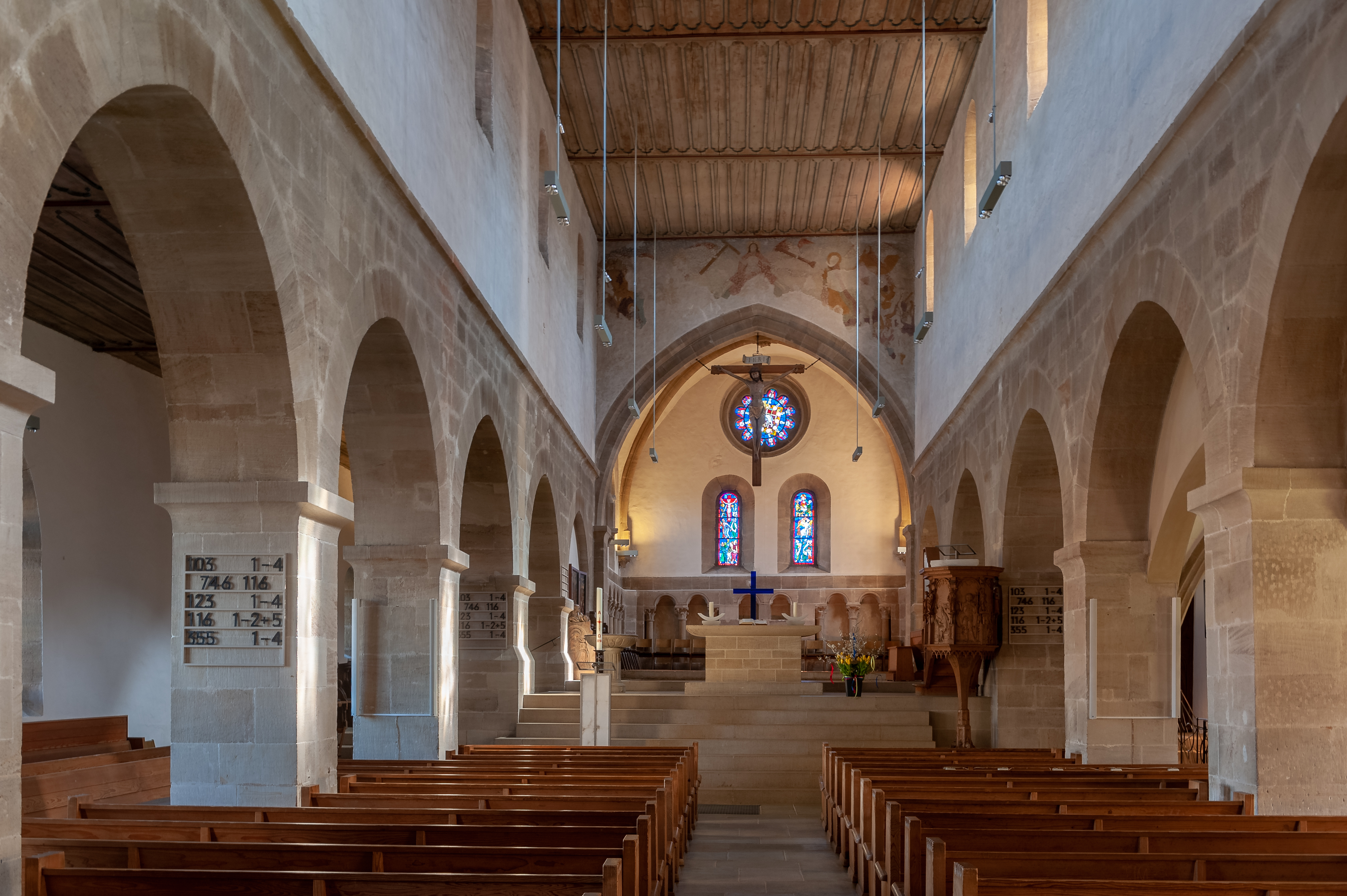 Kloster Denkendorf, Innenraum der Kirche